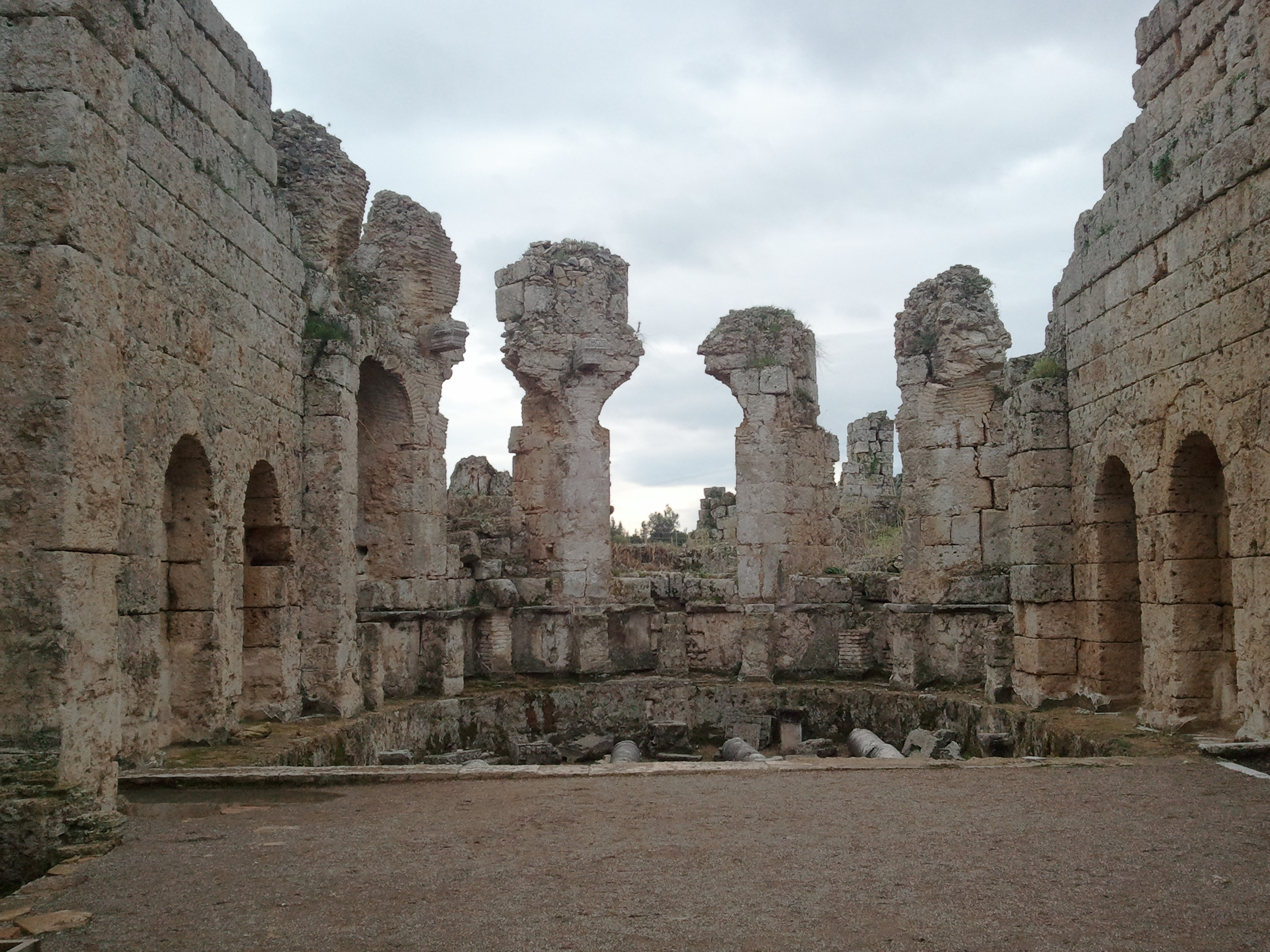 Perge Güney Hamamı, M.S. 1. yüzyıldan 5.yüzyıla kadar uzanan farklı evrelere ait inşaat, değişiklik ve ekleme faaliyetlerini yansıtmaktadır.